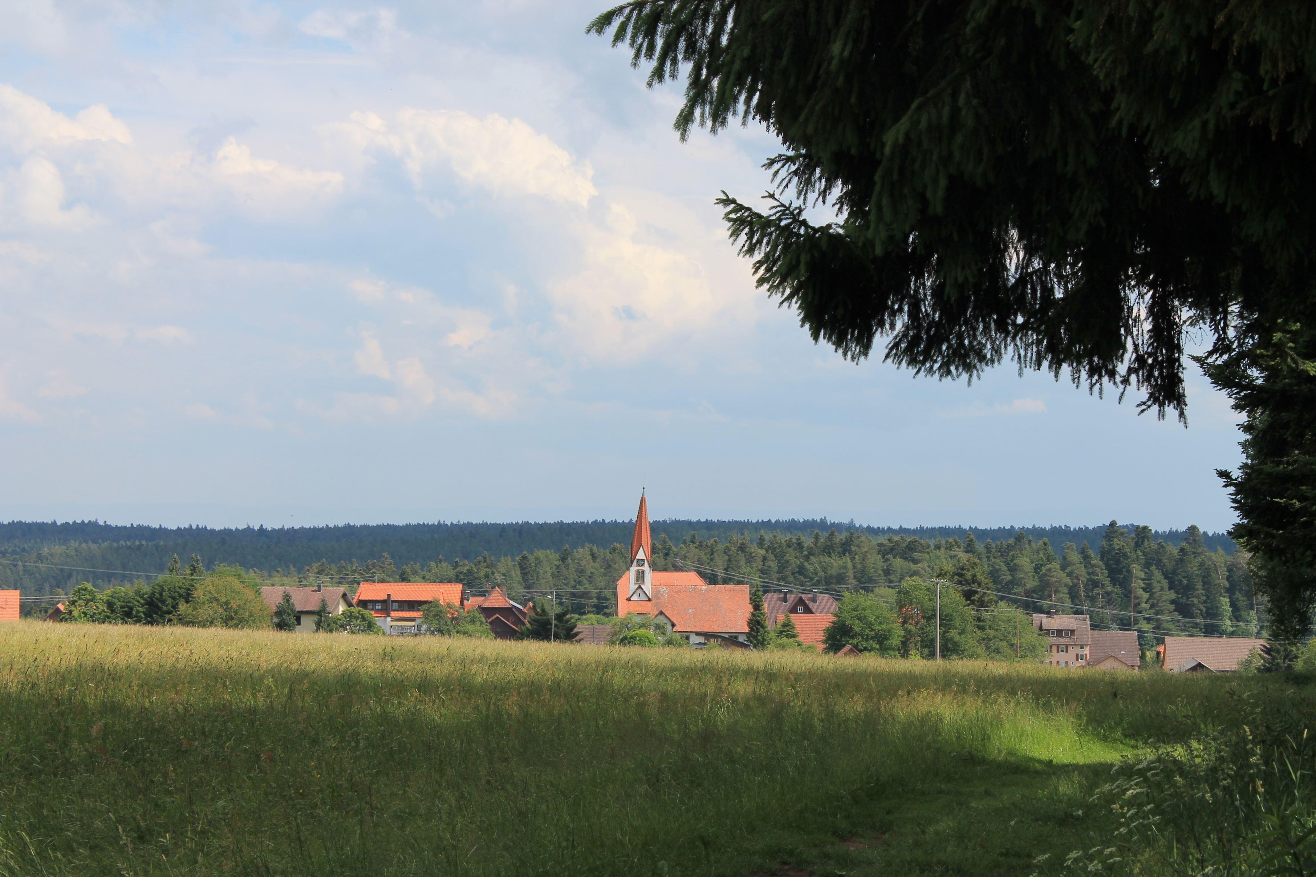 Aichelberger Jugendstilkirche mit Sicht bis zur Schwäbischen Alb.